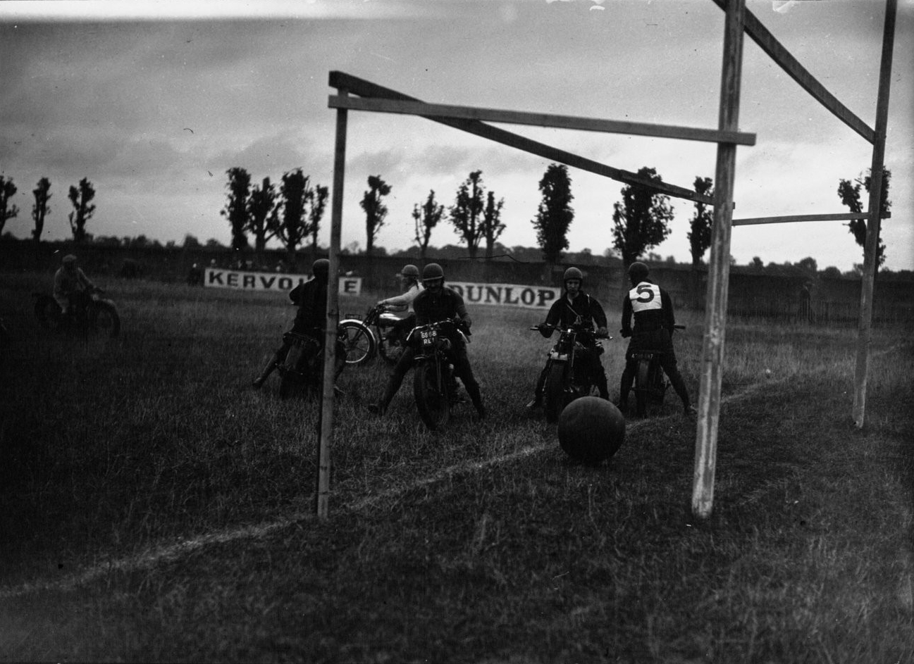 Coupe de France de motoball 1932 : rencontre entre le Motocyclub Dyonisien et le Motoclub de Vitry au stade Saint-Germain : Les Dyonisiens (Saint-Denis) marquent un but.